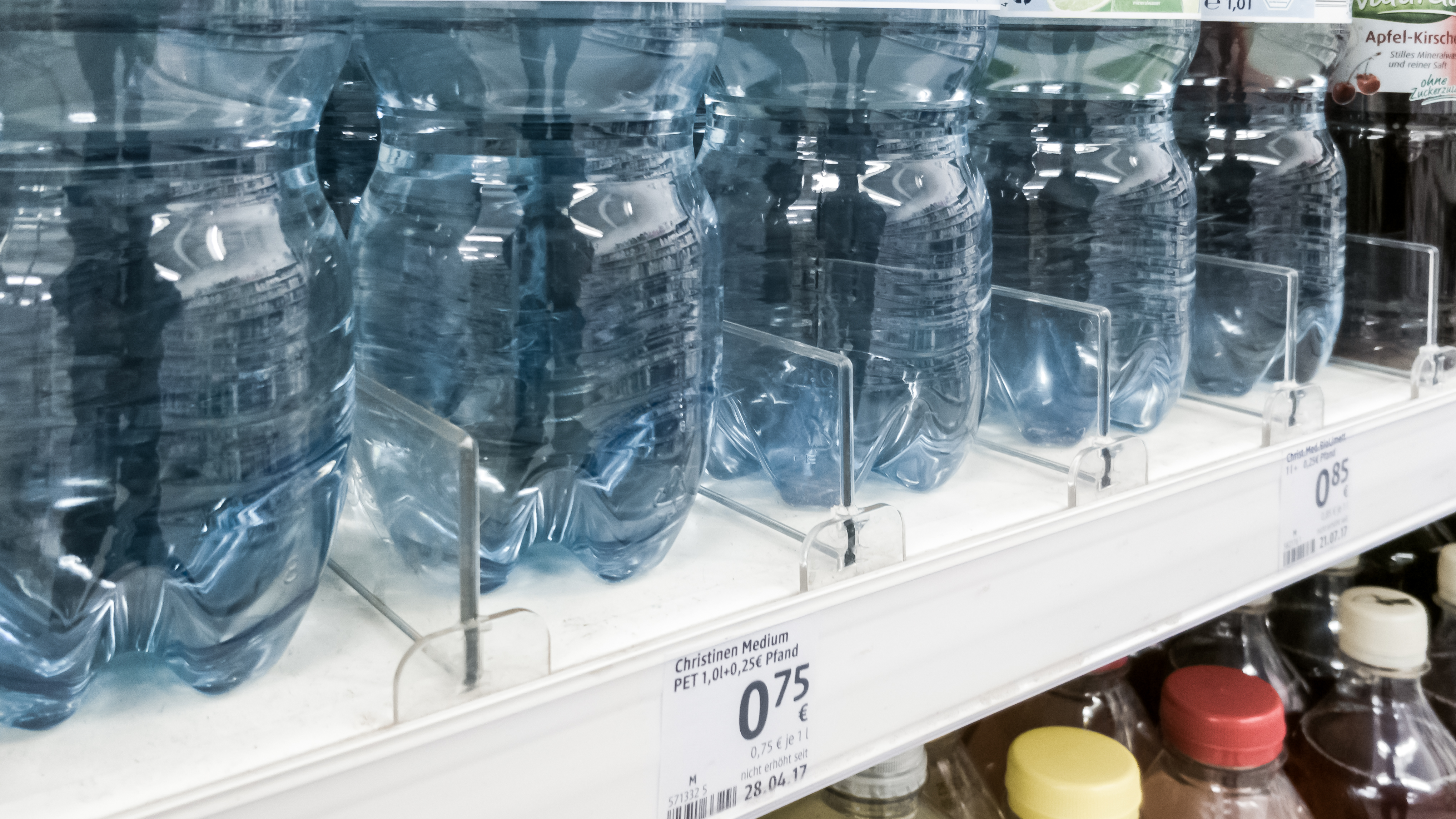 Warenteiler in einem Supermarktregal für Getränkeflaschen